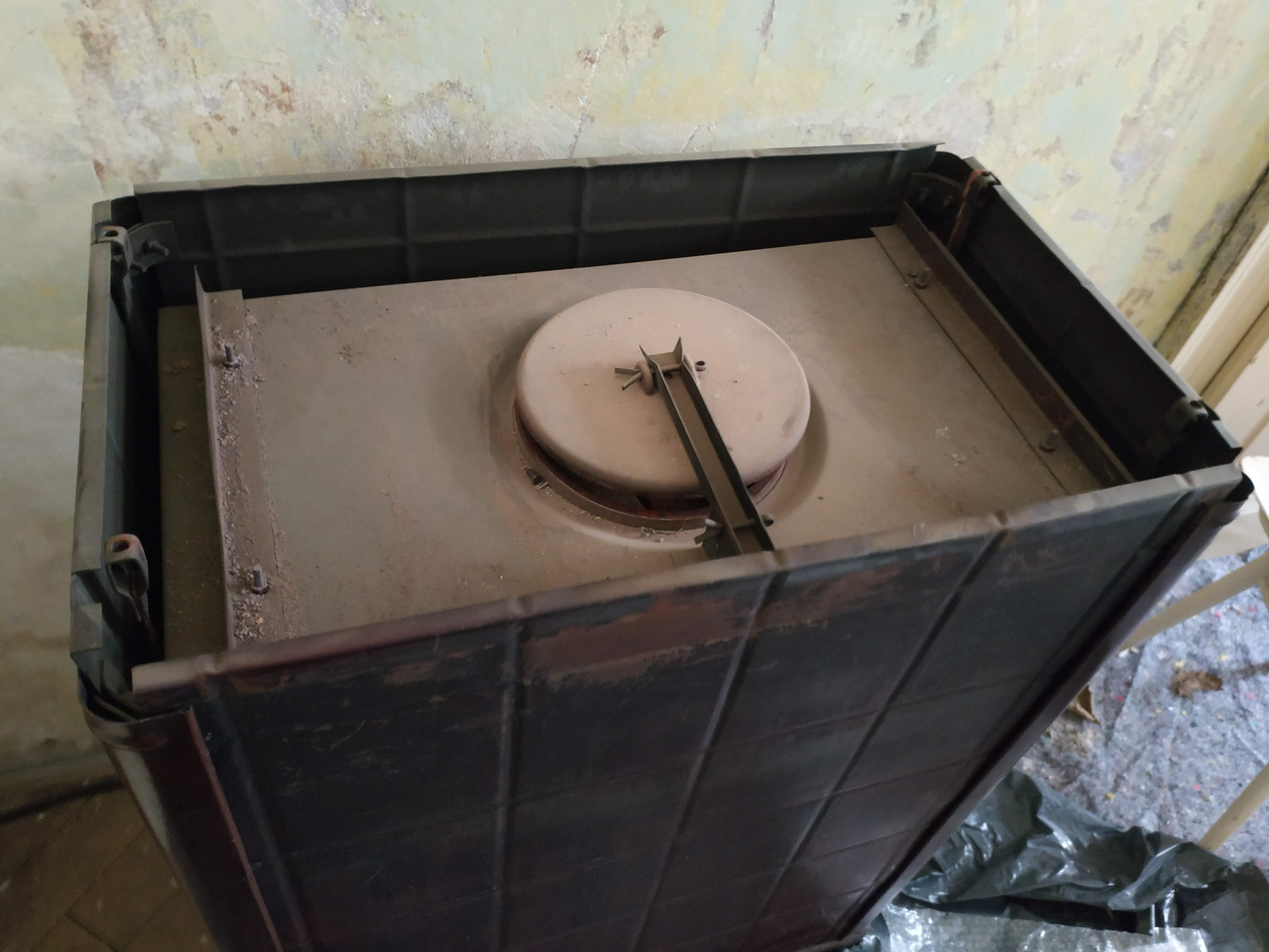 Poklop komínu v akumulačkách Hrdina A1-A4.